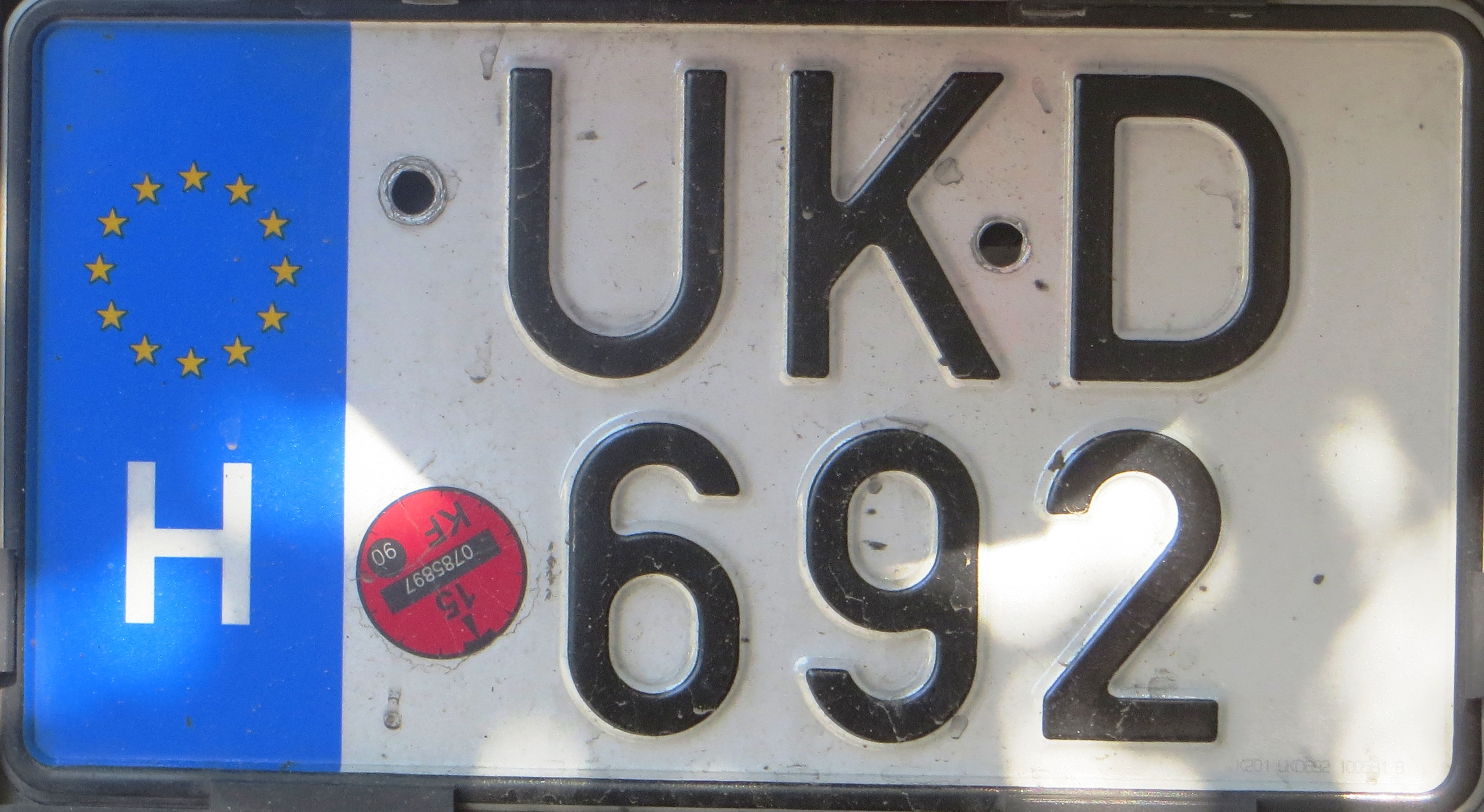 Hongarije motorfiets kentekenplaat oud